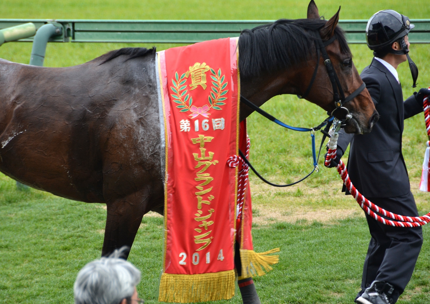 2014年4月19日（土）に中山競馬場の第11競走で行われた「第16回中山グランドジャンプ」で、ウイナーズサークルにて優勝レイを装着した5番アポロマーベリック号を、観客席から撮影したもの。